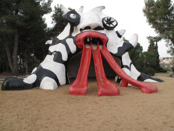 Jérusalem - quartier de Kyriat Yovel - jeu pour enfants en forme de monstre